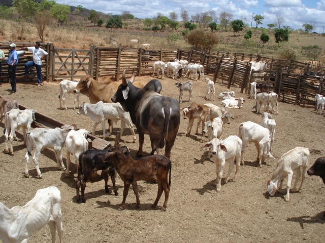 Cattle pen